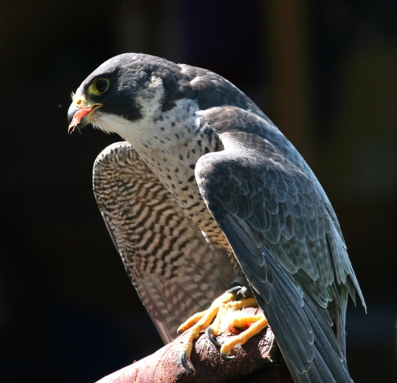 Peregrine Falcon (Falco peregrinus)